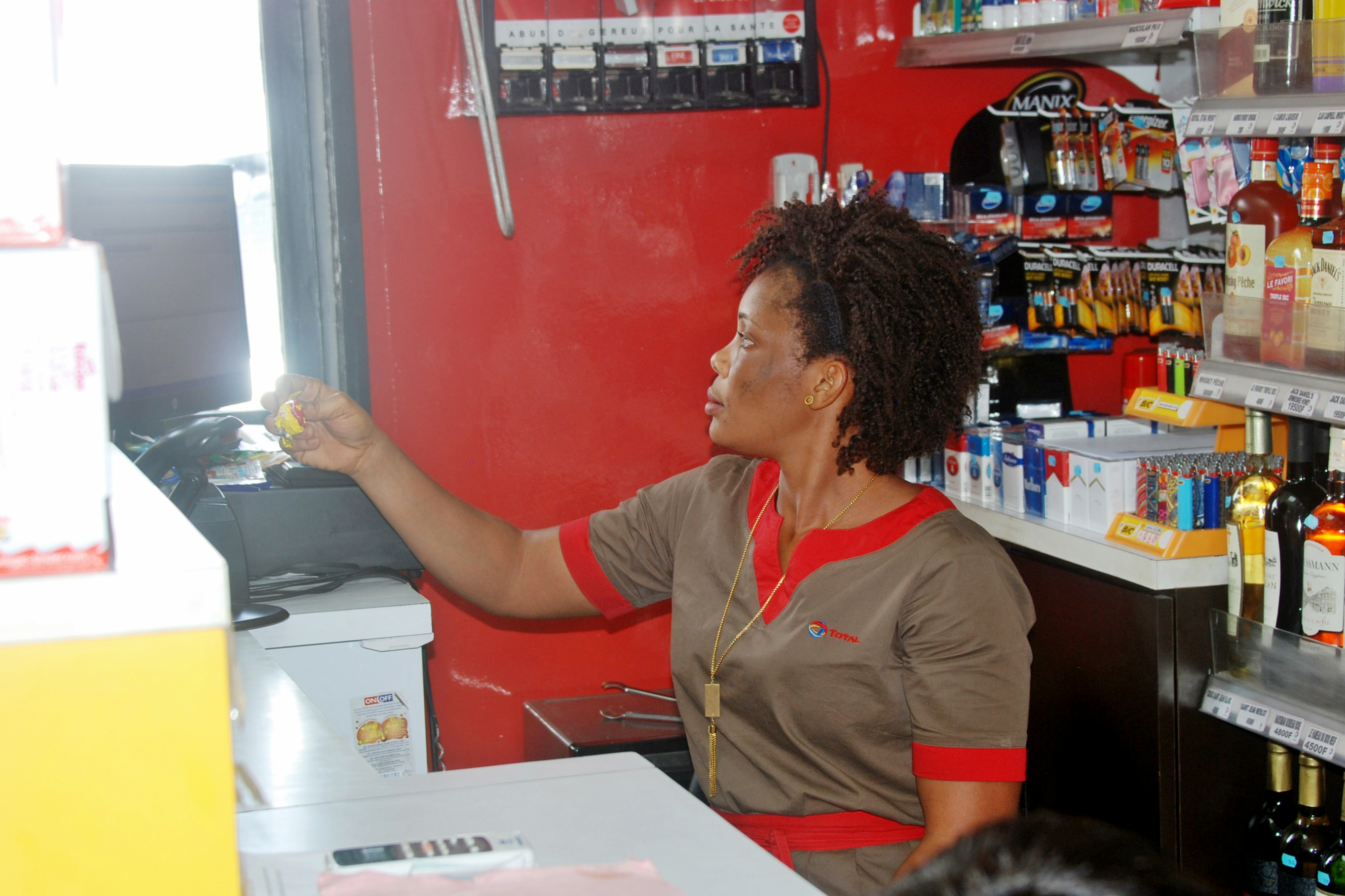 caissière d'une supérette à Abidjan This is an image of "African people at work" from Ivory Coast